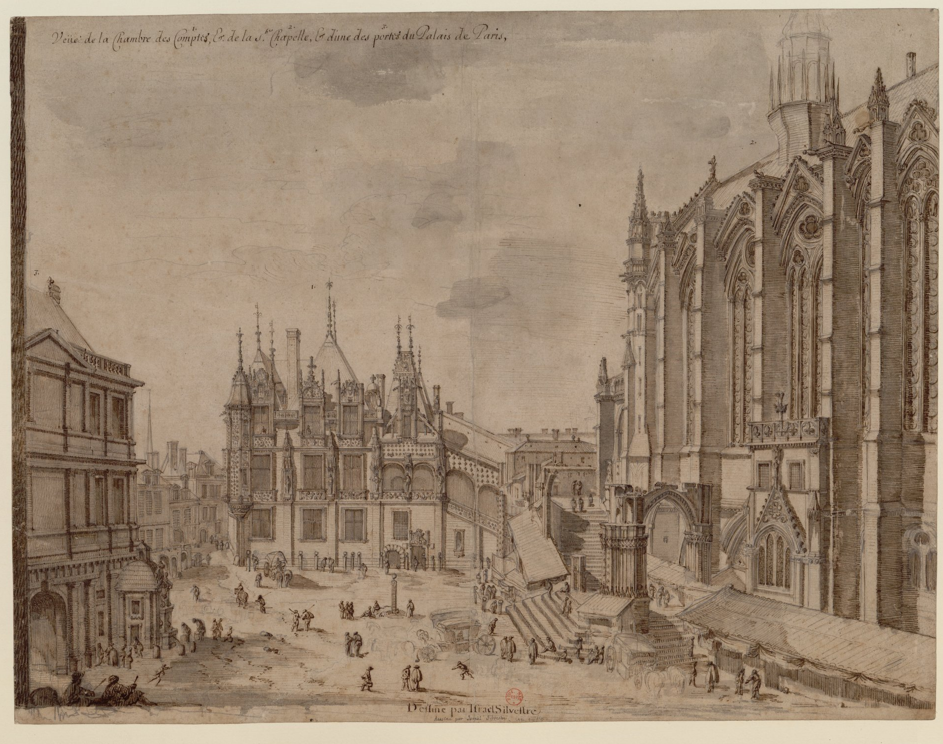 Veüe de la Chambre des Comptes, Et de la Ste Chapelle, Et d'une des portes du Palais de Paris.